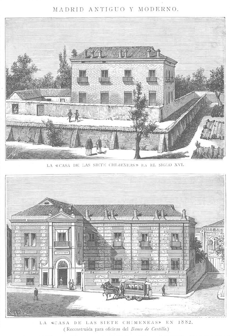 La Casa de las Siete Chimeneas en el siglo XVI y en 1882.